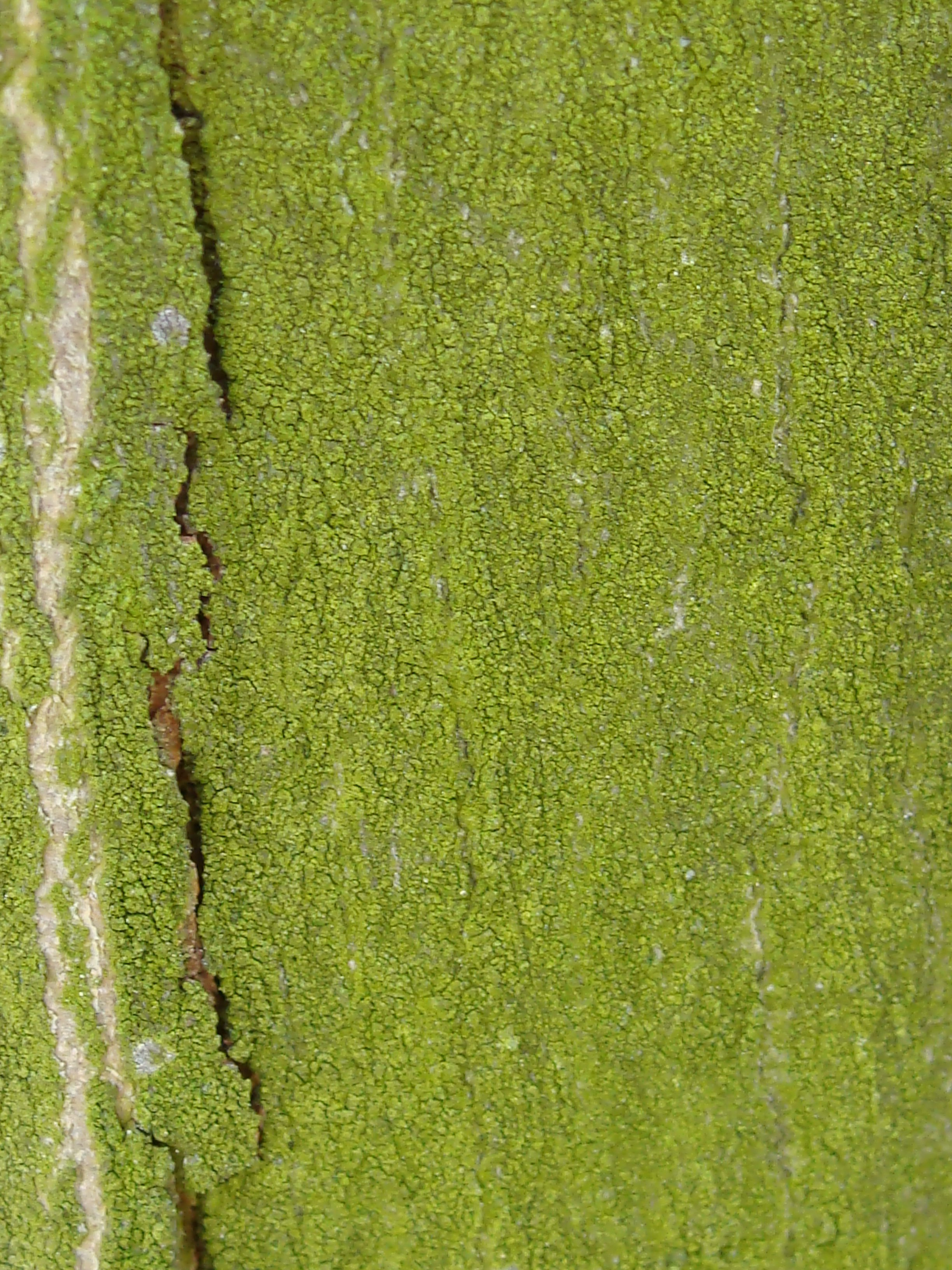 Kolonie pierwotka (Protococcus lub Pleurococcus) na pniu drzewa.